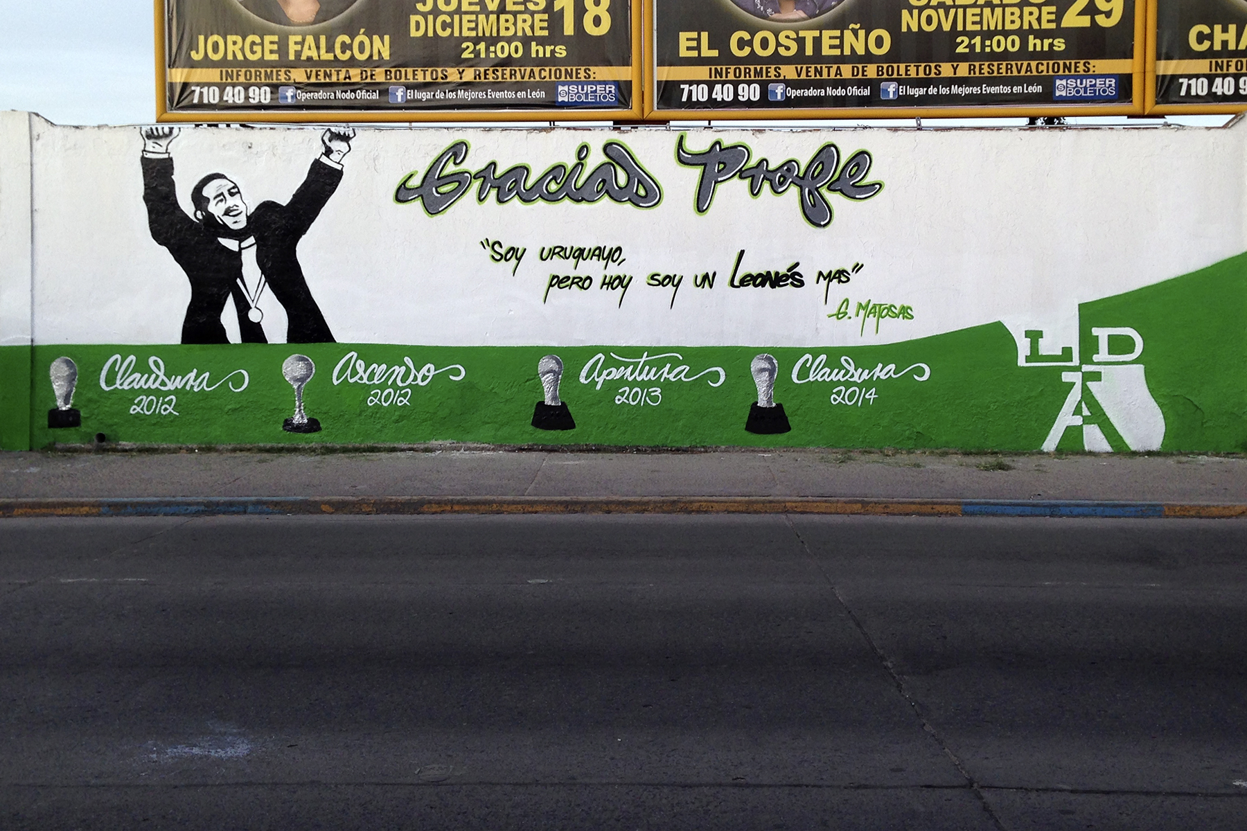 Mural en agradecimiento a Gustavo Matosas en León, Gto., México